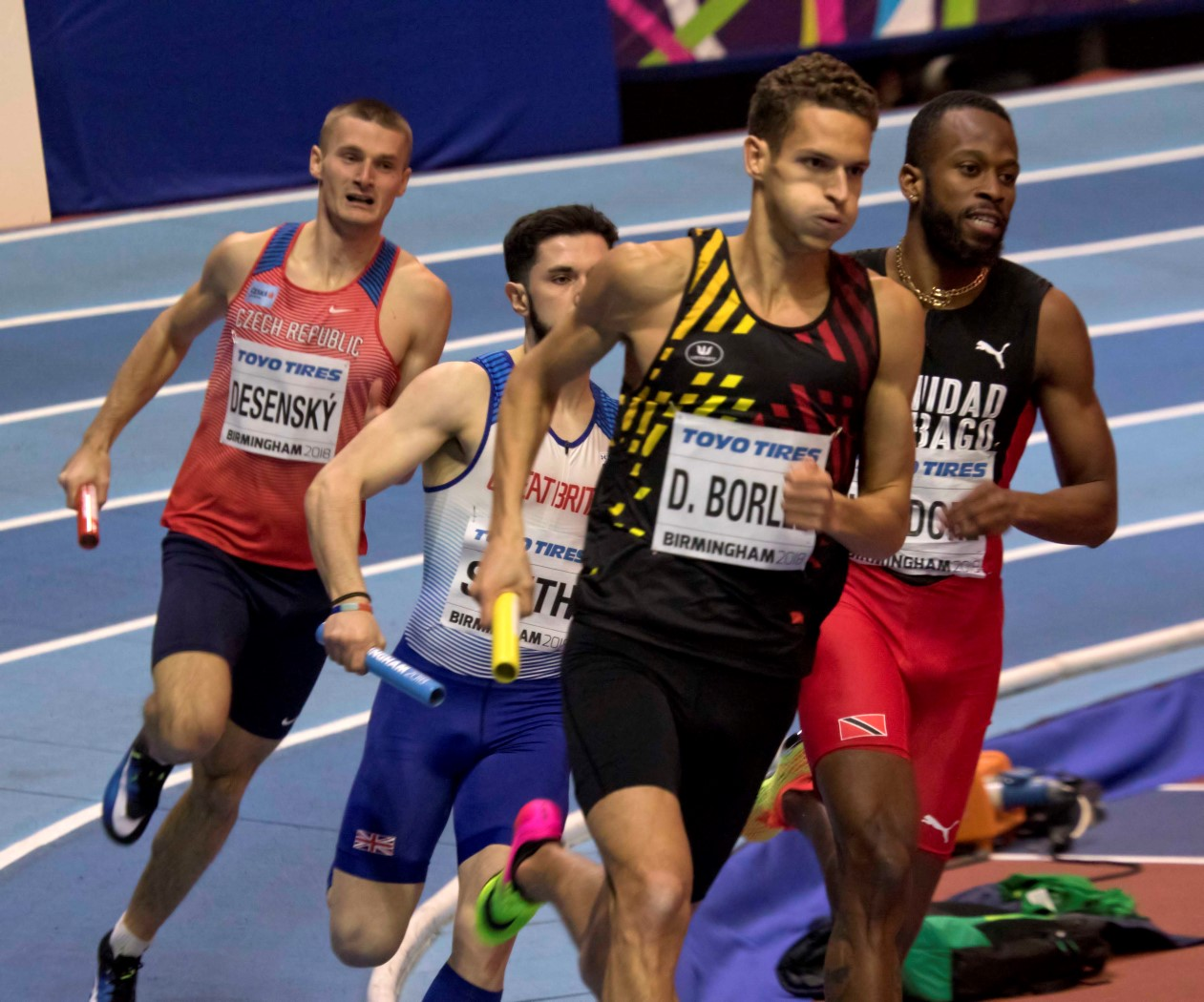 WK040315 finale 4x400m heren dylan